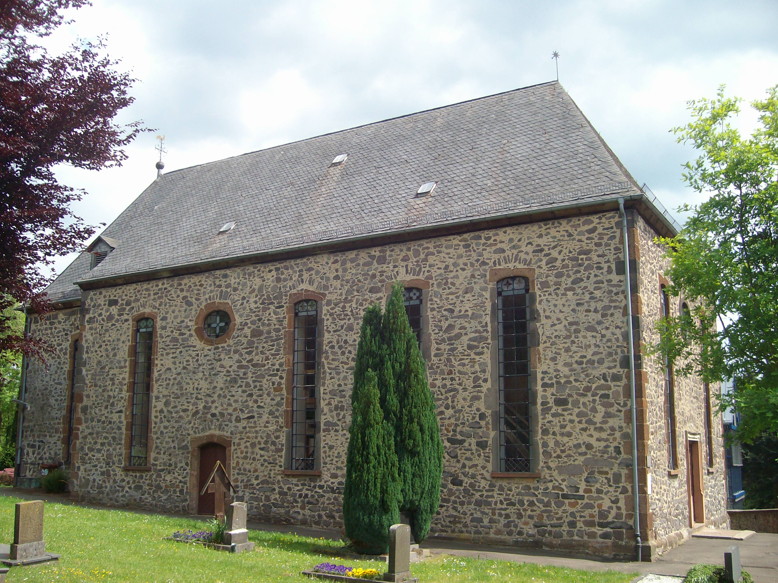 Hospitalkirche Grünberg, Landkreis Gießen, Hessen, Deutschland